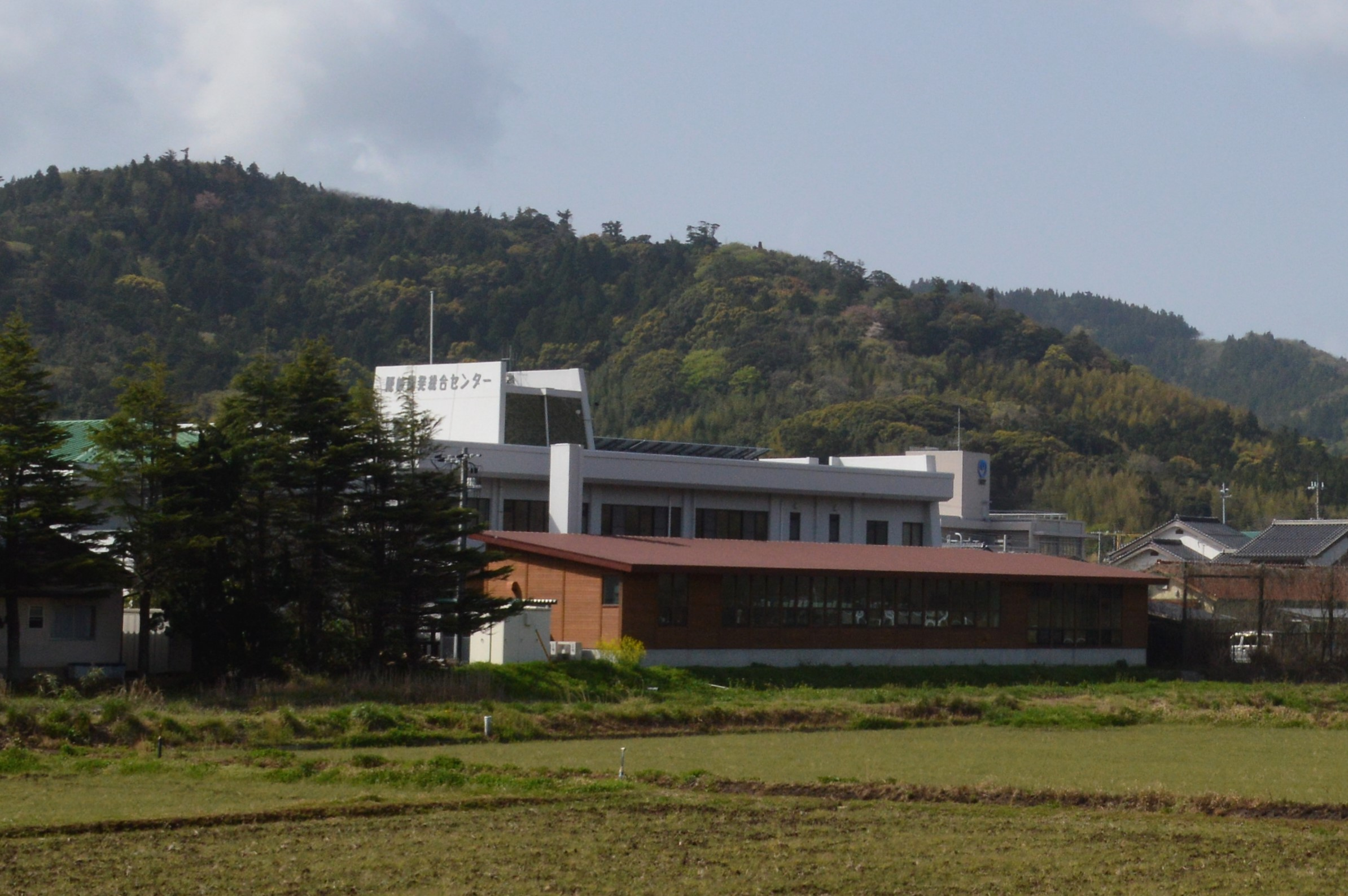 島根県隠岐郡海士町の隠岐開発総合センター。海士町中央図書館などが入っている。